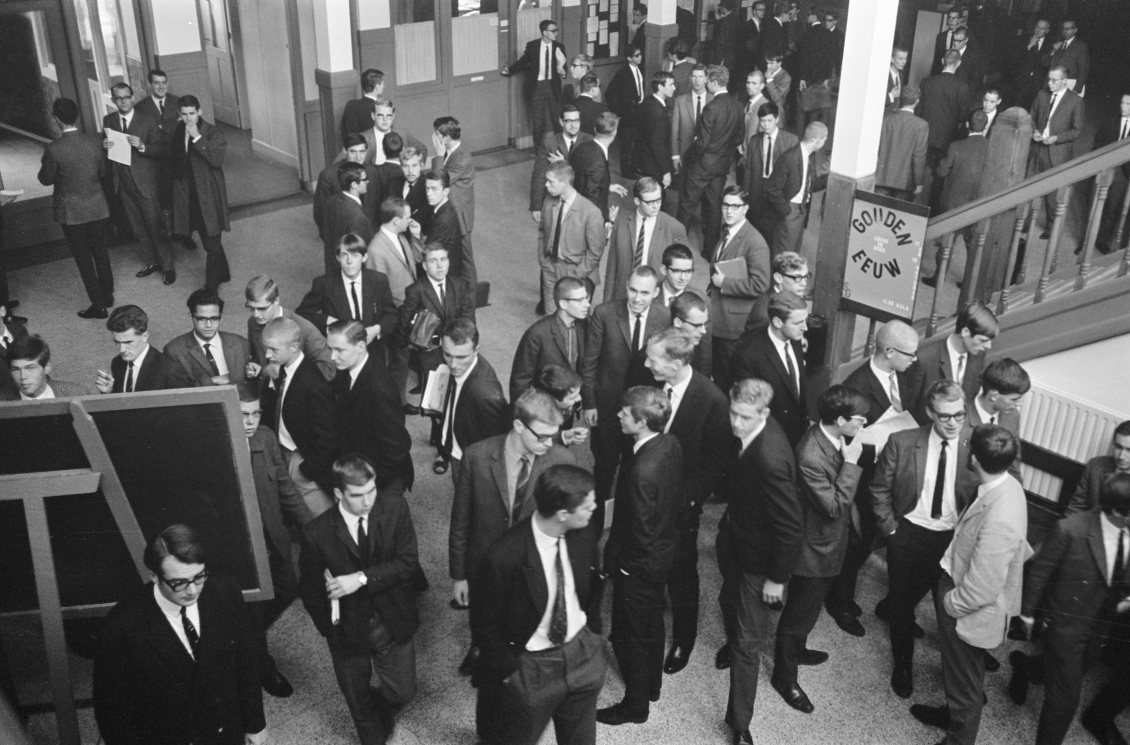 Collectie / Archief : Fotocollectie Anefo Reportage / Serie : Studenten Teach-In in Rotterdam over het beleid van minister van Onderwijs en Wetenschappen Isaäc Arend Diepenhorst Beschrijving : studenten Datum : 7 oktober 1966 Locatie : Rotterdam, Zuid-Holland Trefwoorden : studenten Fotograaf : Eric Koch / Anefo Auteursrechthebbende : Nationaal Archief Materiaalsoort : Negatief (zwart/wit) Nummer archiefinventaris : bekijk toegang 2.24.01.05 Bestanddeelnummer : 919-6535